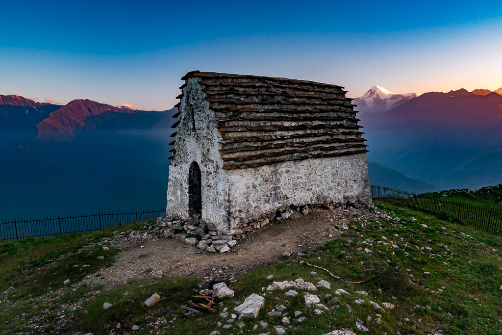 Древний ингушский храм Мят-Сели на горе Мятлоам